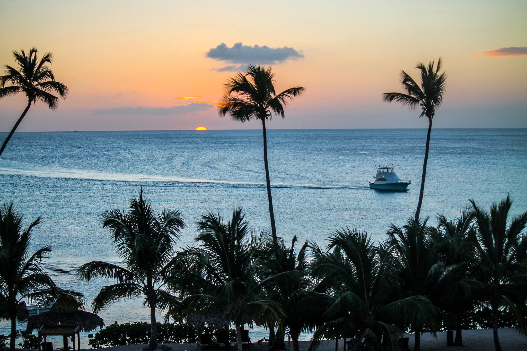 Atardecer en la playa de Bayahibe próximo a la entrada del Parque Nacional del Este, República Dominicana.